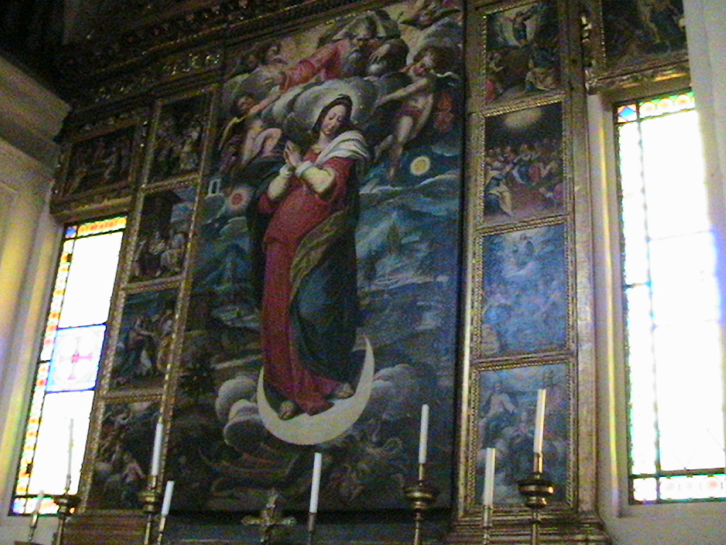 Rivarolo Mantovano - Chiesa parrocchiale di Santa Maria Annunciata - Cappella del Rosario